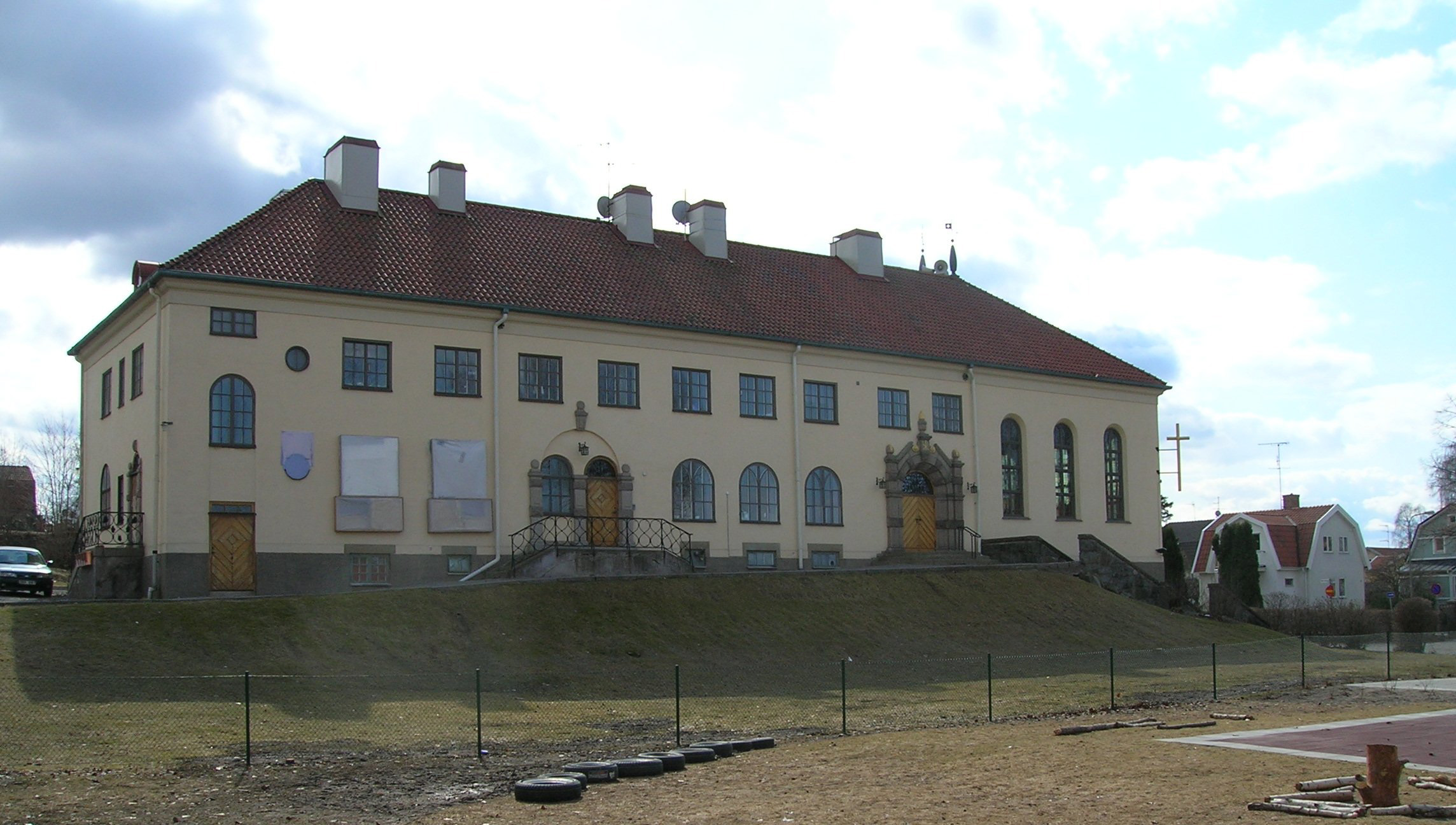 Mariehälls församlingshus (ursprungligen Bromma kommunalhus), Mariehäll, Stockholm